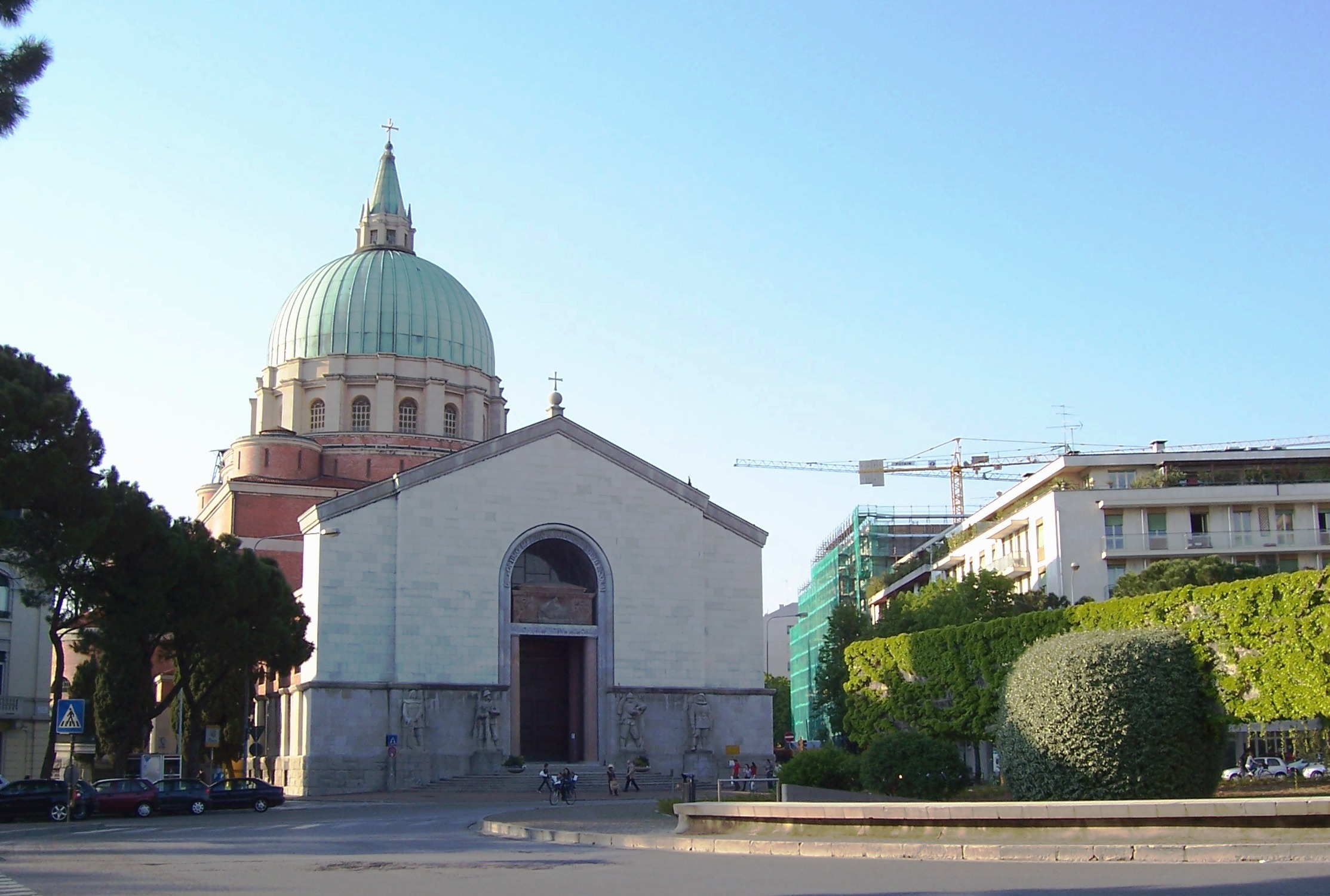 Tempio ossario Udine